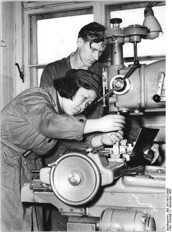 Arnstadt, Auszubildende aus China Zentralbild Bez. Red. Erfurt-Schmidt 3 Motive 2.12.1955 Chinesische Techniker und Arbeiter lernen ein halbes Jahr im VEB Fernmeldeamt Arnstadt Sechs chinesische Techniker und Arbeiter sind seit einigen Wochen im VEB Fernmeldewerk in Arnstadt tätig. Die chinesischen Freunde, die später beim ufbau von Fernmeldewerken in der Volksrepublik China tätig sein werden, eignen sich in Arnstadt Spezialkenntnisse in der Vorfertigung wie Fräserei, Dreherei, Automatendreherei und Bohrerei an. Ausserdem erhalten sie in Sonderschulungen den notwendigen theoretischen Unterricht. U.B. z.: Die chinesische Technikerin Huang Ming-hsie wird vom Kollegen Egon Nebelung am Bohrwerk ausgebildet. Information added by Wikimedia users.